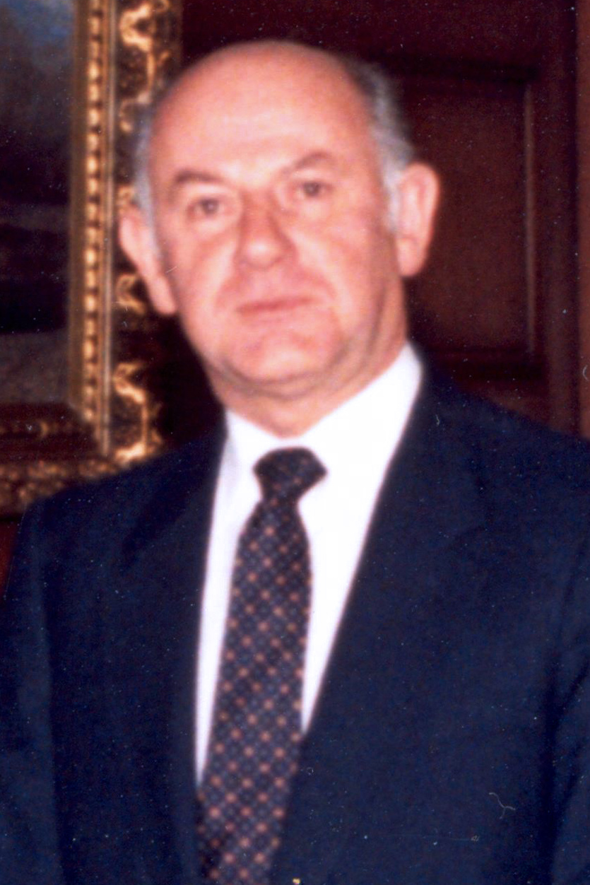 El primer Consejo del Banco Central autónomo en 1990. Roberto Zahler, Enrique Seguel, Alejandro Foxley (Ministro de Hacienda), Andrés Bianchi (presidente), Juan Eduardo Herrera y Alfonso Serrano.